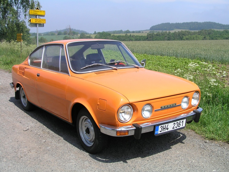 Škoda 110 R 1977